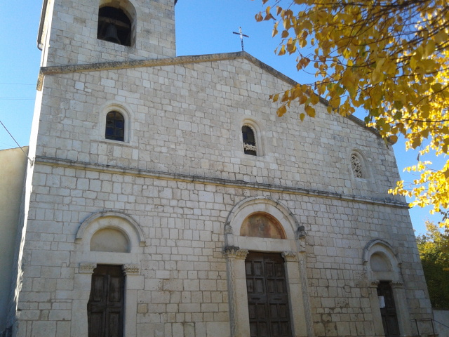 Facciata della chiesa di Santa Maria delle Grazie